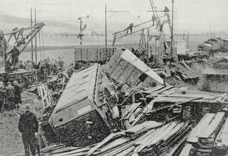 Eisenbahnunglück vom 19. Mai 1941 in Münsingen: Pressebild unbekannter Herkunft